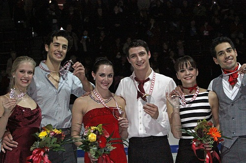 Подиум в танцах на льду 2011 Skate Canada International. Слева на право: Кейтлин Уивер / Эндрю Поже, Тесса Вертью / Скотт Моир, Анна Каппеллини / Лука Ланотте